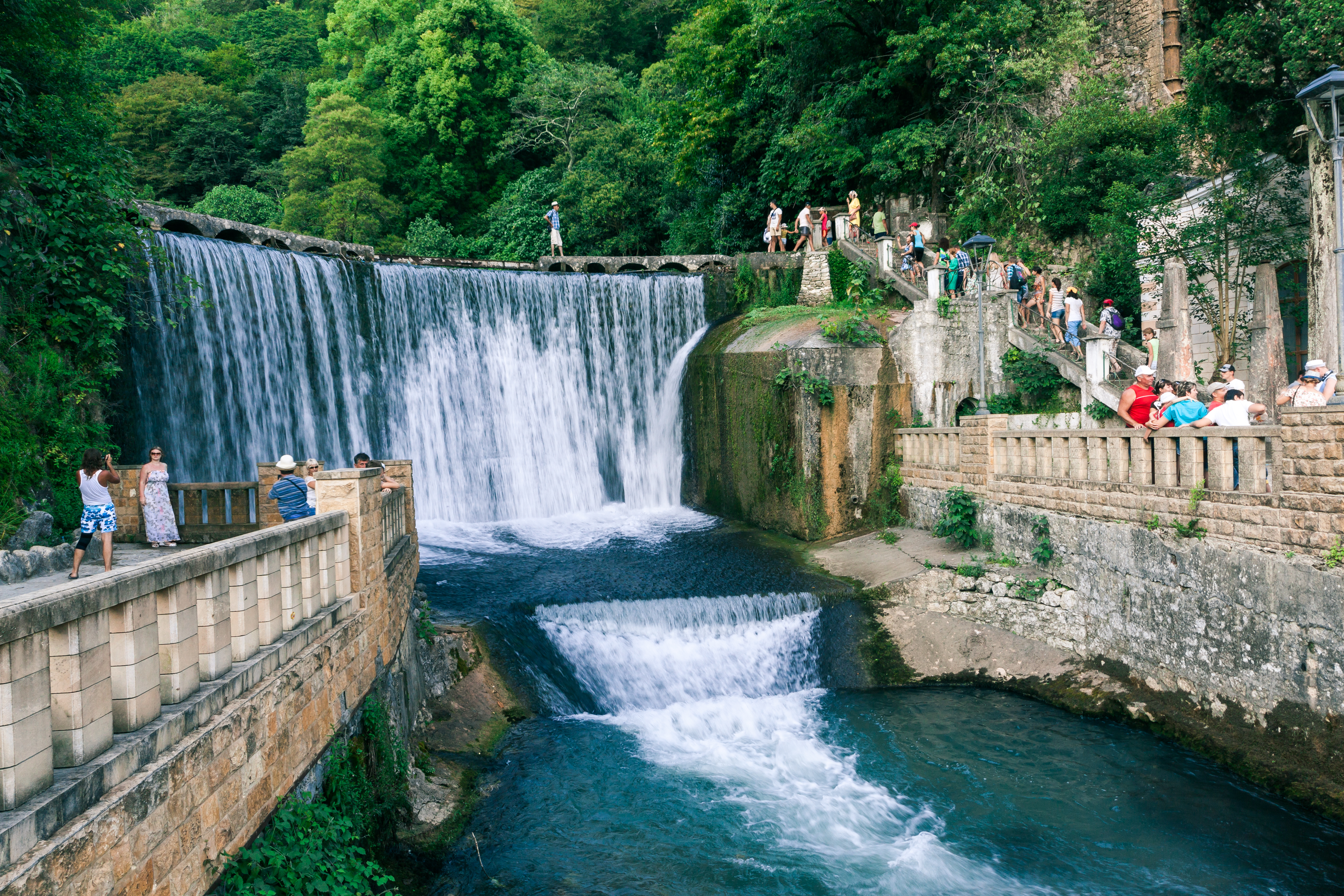 Новый Афон. Водосброс на Псырцхинской ГЭС